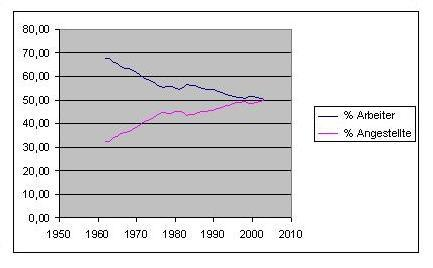 Prozentualer Anteil Arbeiter/Angestellte in Deutschland 1962-2003. Arbeitnehmerstatistik